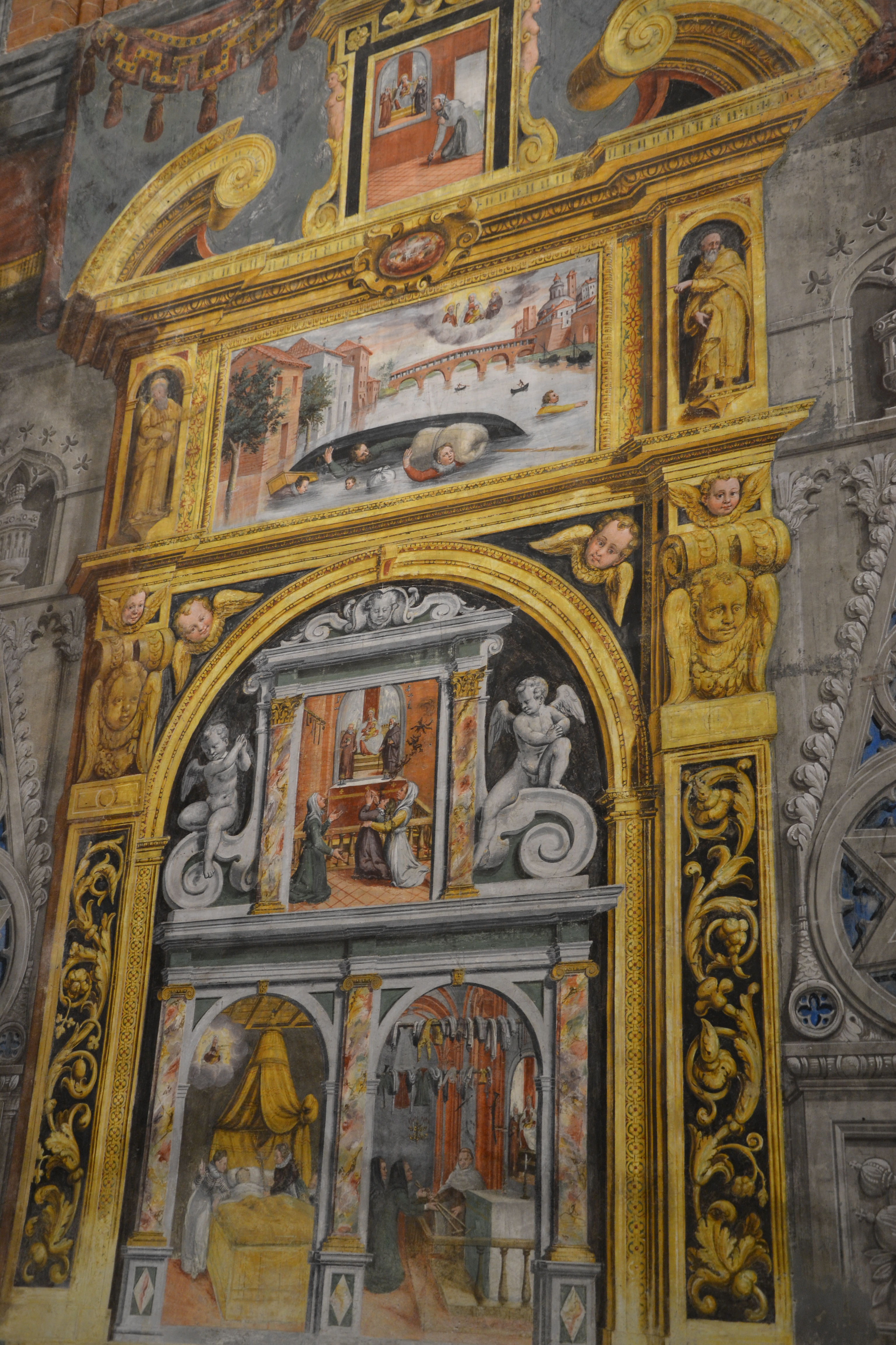 Chiesa di Santa Maria del Carmine (Pavia)